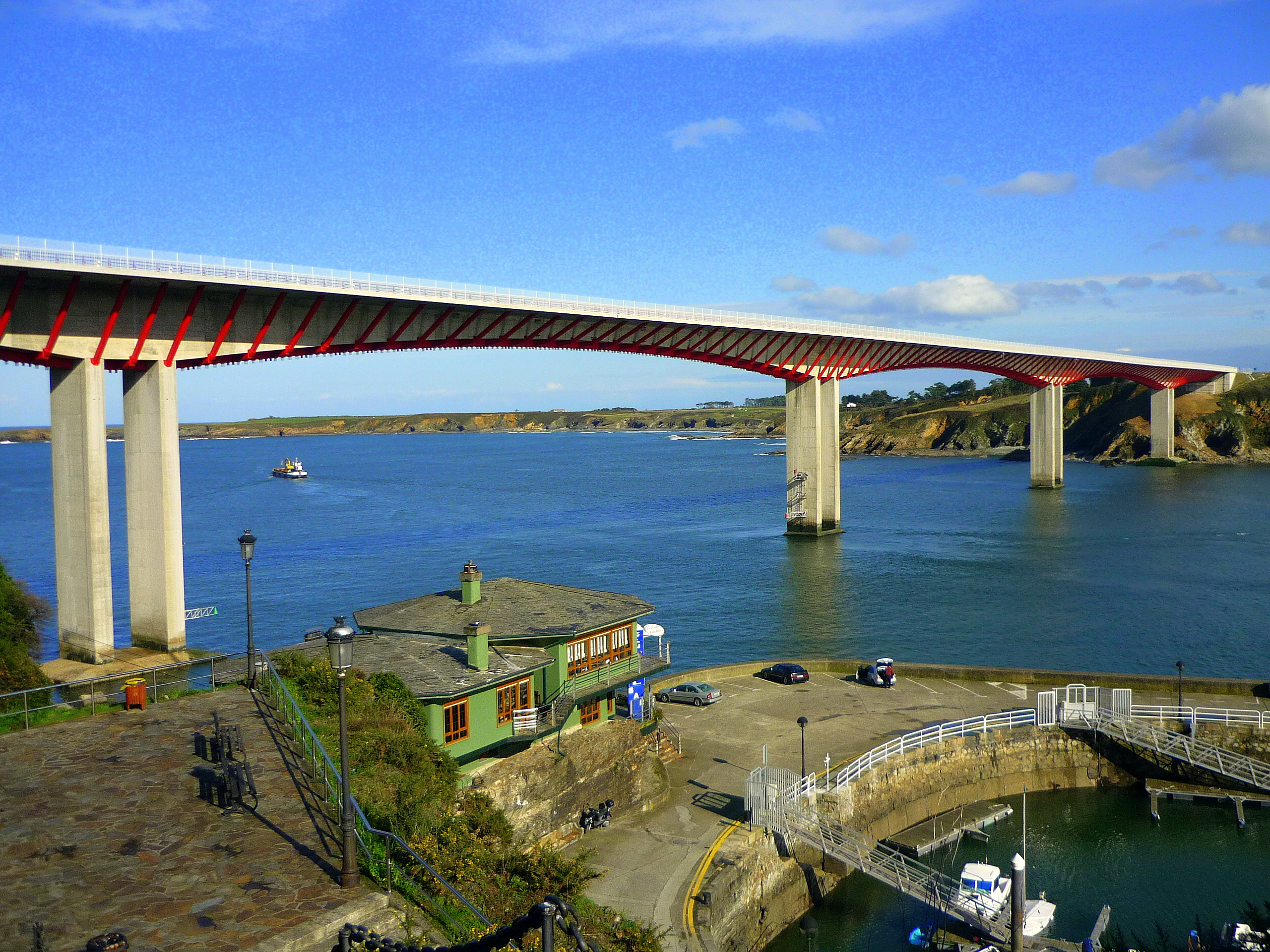 Une Galicia e Asturias. Agora está dobrado, convertido en autovía por onde se circula a 120Km/hora. Abaixo, porto de Ribadeo.